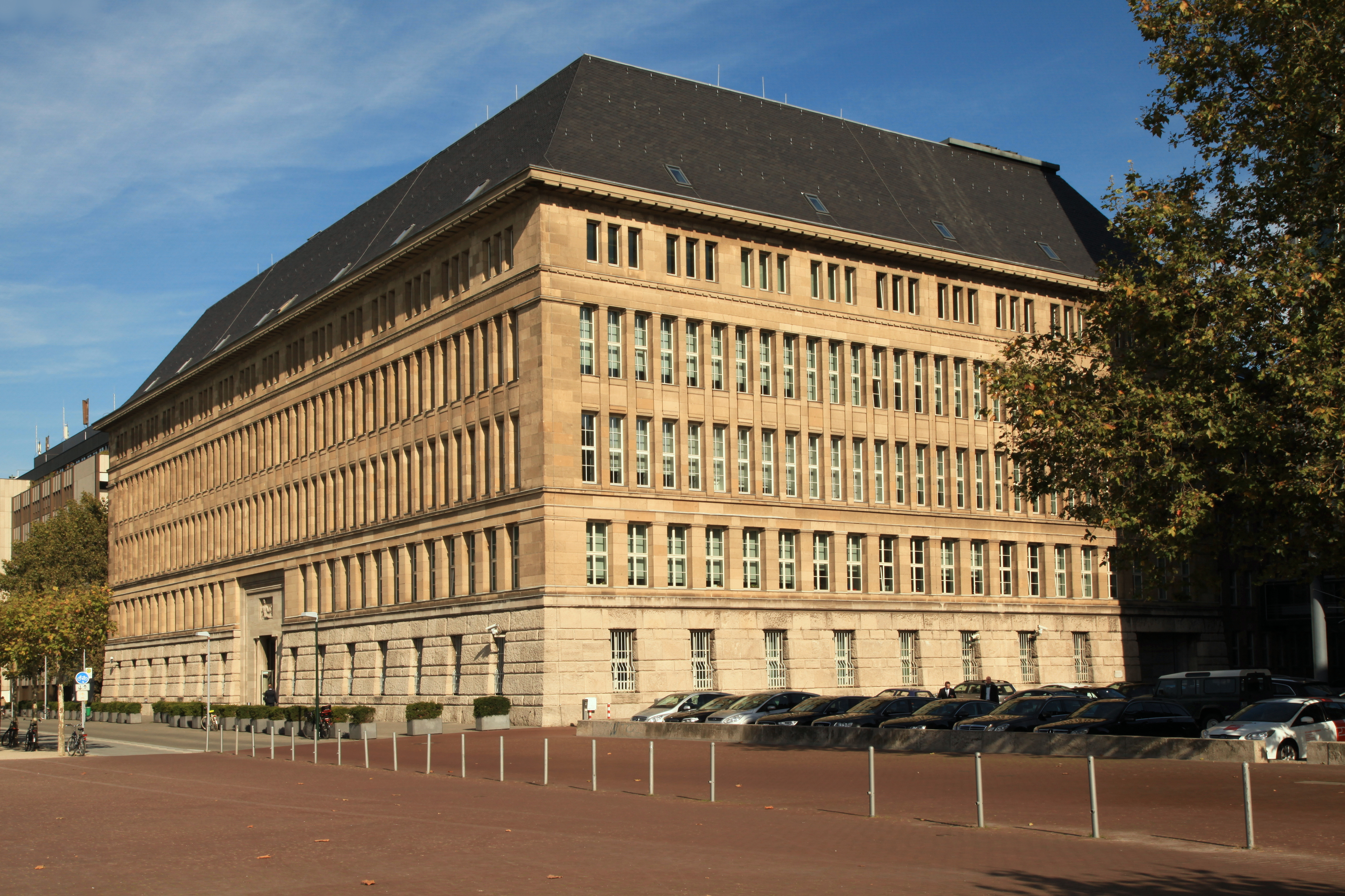 Mannesmann-Haus am Mannesmannufer in Düsseldorf